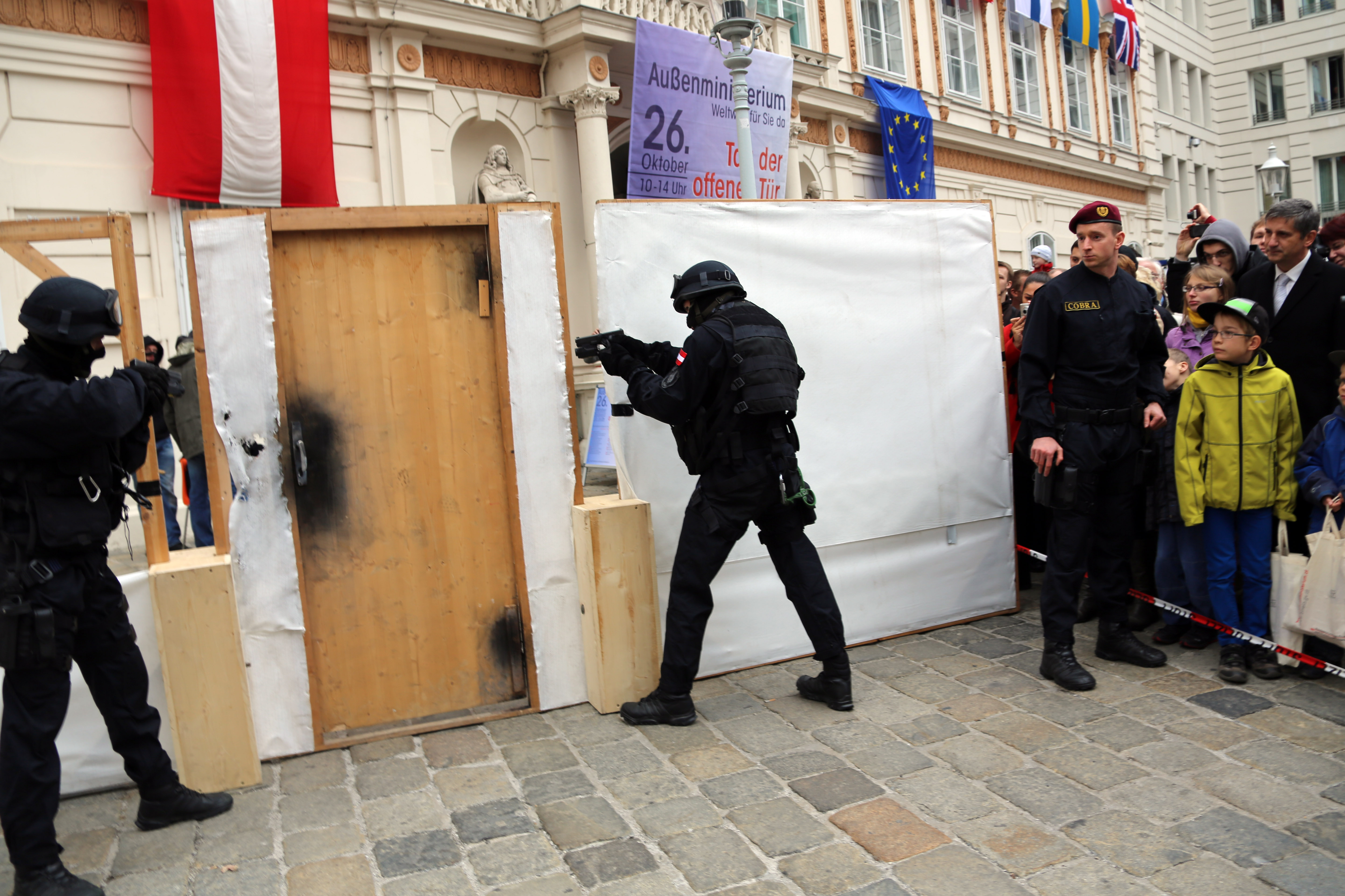 Freitag, 26. Oktober 2012 - Tag der offenen Tür im Außenministerium in Wien aus Anlass des Nationalfeiertages.